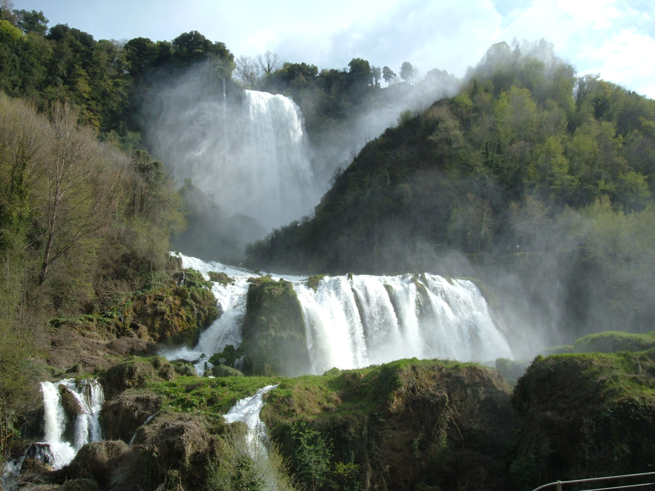 Cascata delle Marmore